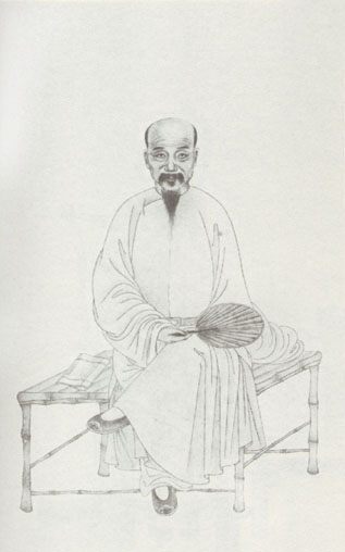 程瑶田，清代学者。Cheng Yaotian